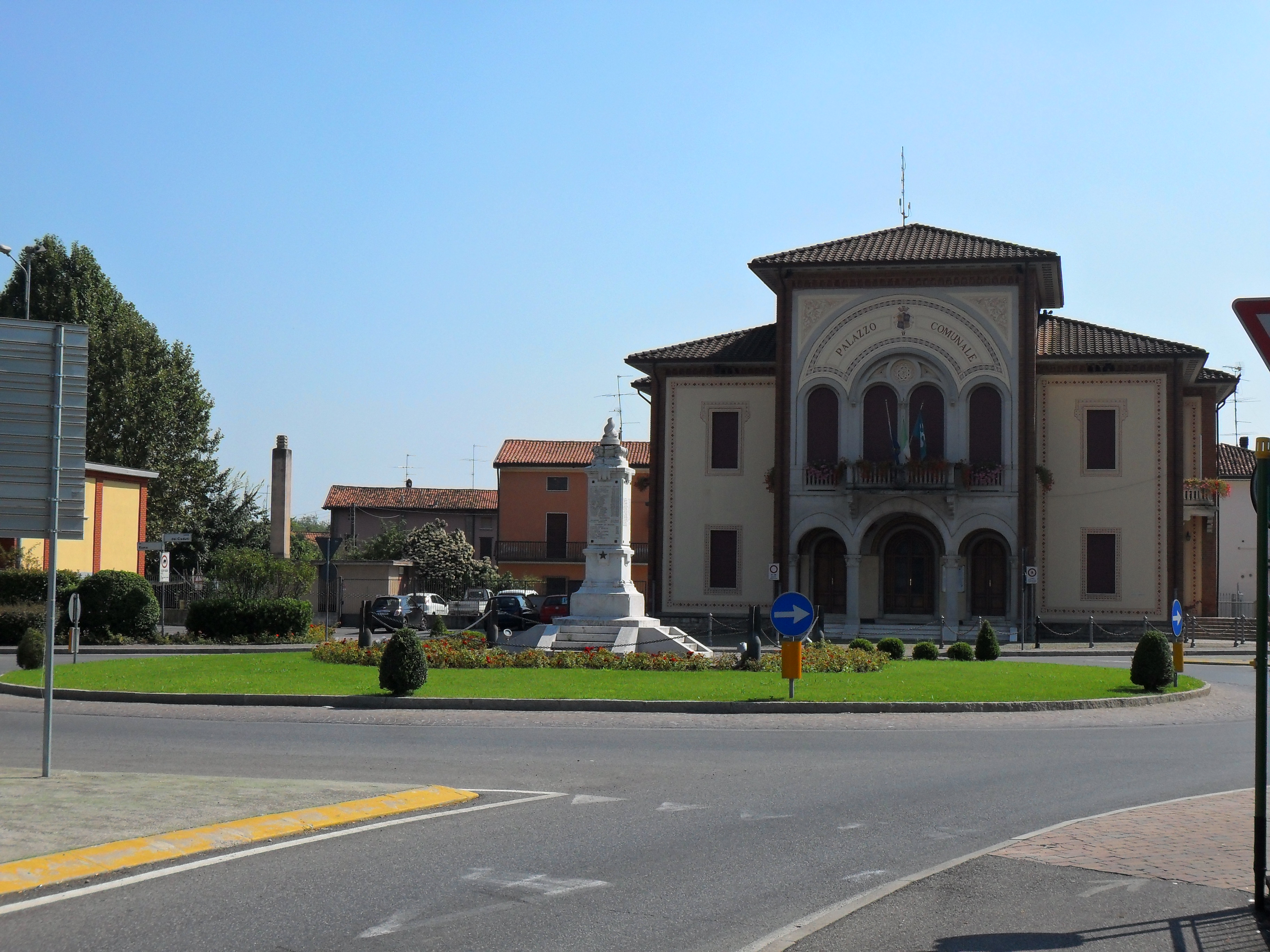 Piazza dei Caduti a Poncarale. In primo piano il monumento ai caduti e sullo sfondo il comune.